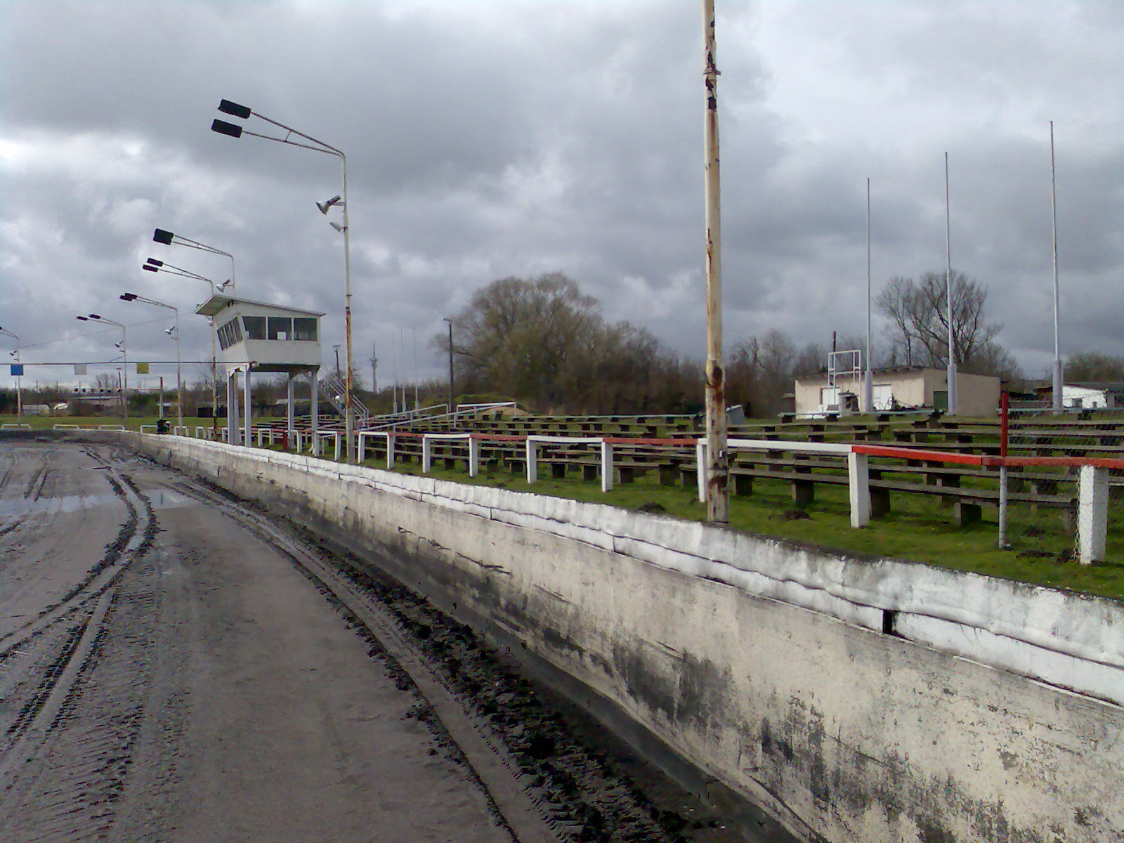 Zuschauerplätze des Paul-Greifzu-Stadions in Stralsund, M-V, Deutschland.